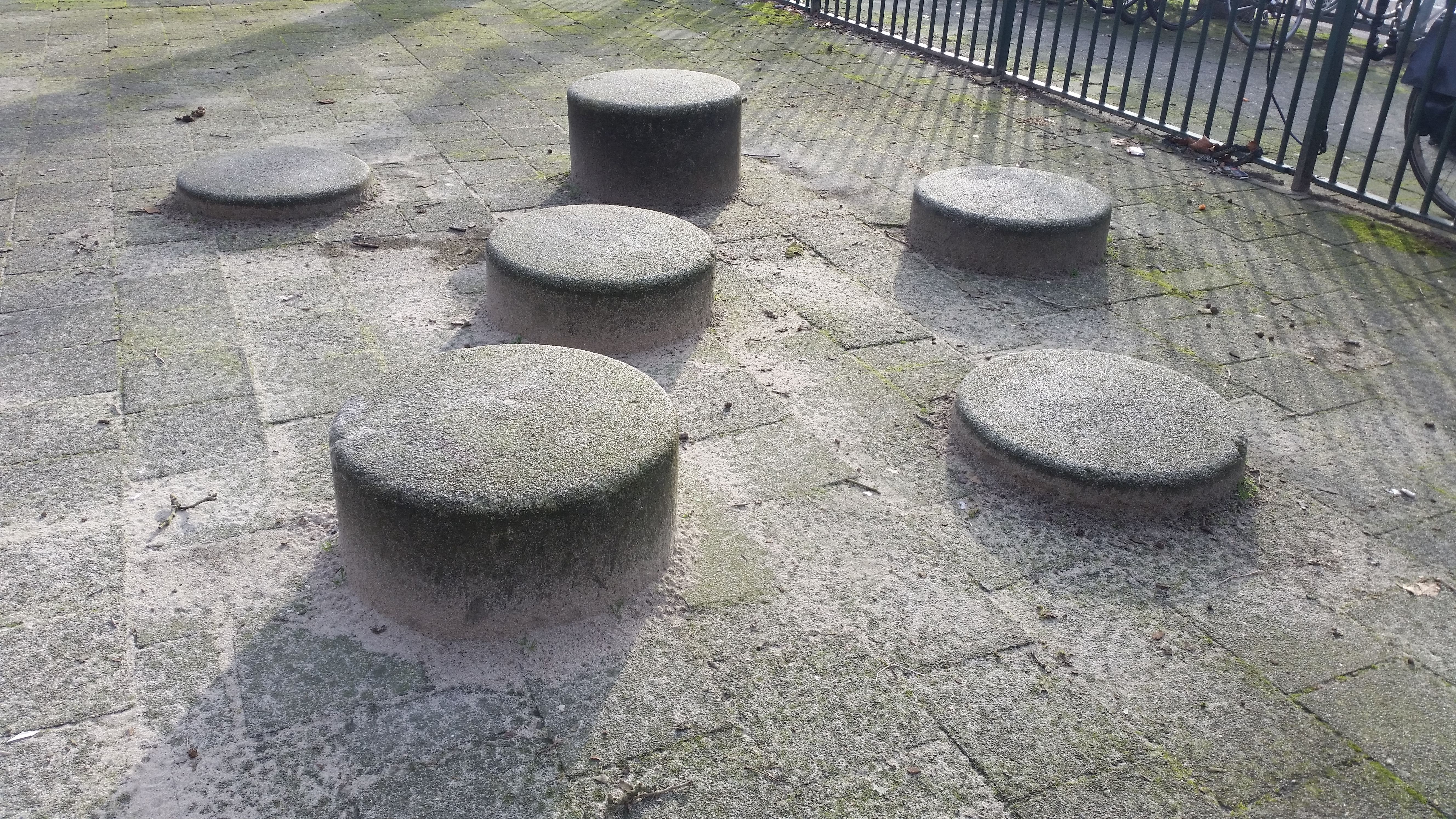 De verzameling speelobjecten ontworpen door Aldo van Eyck aan het Bertelmanplein in Amsterdam-Zuid.